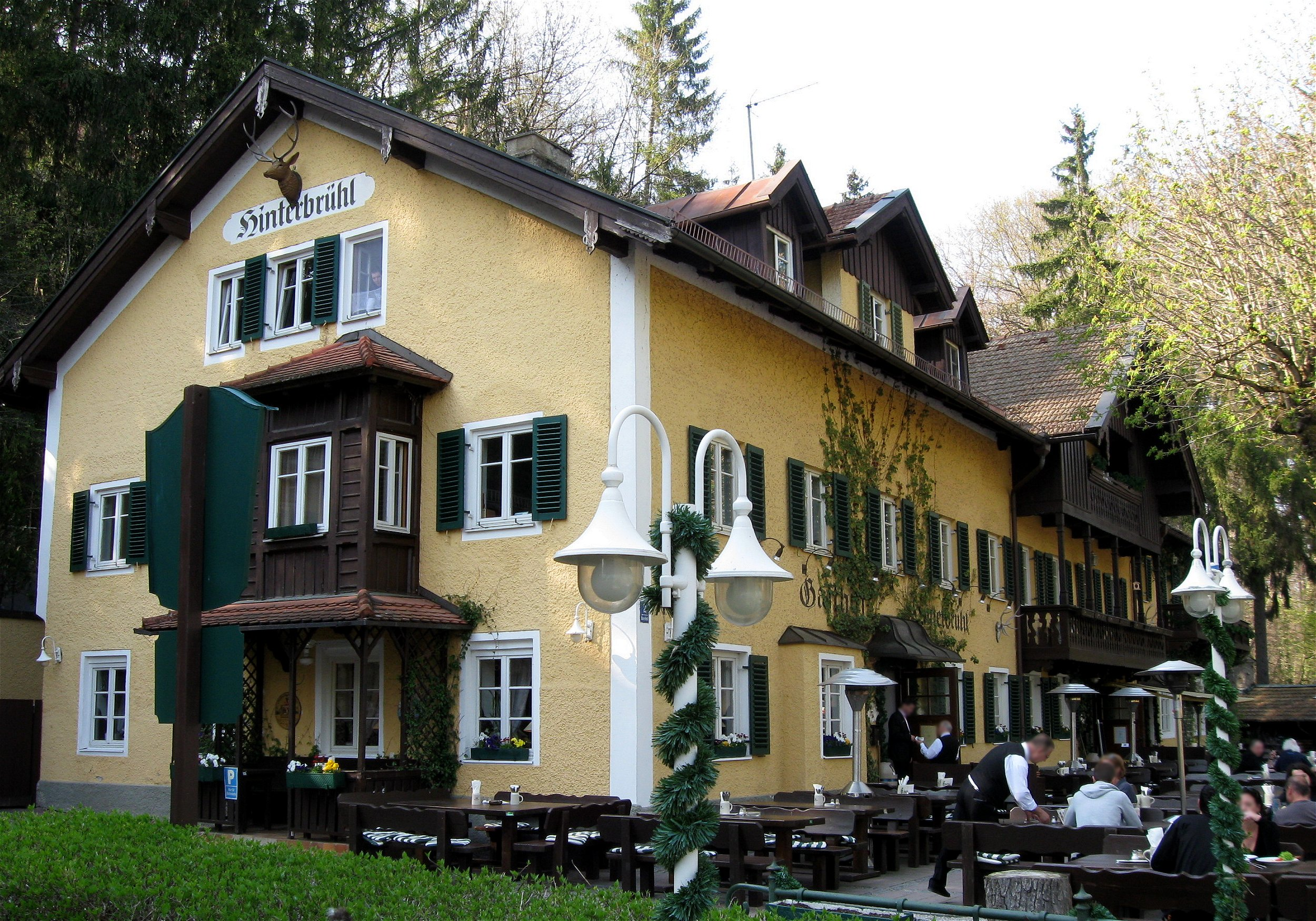 Hinterbrühl 2; Gaststätte Hinterbrühl, langgestreckter Bau, Landhausstil, um 1900; mit Bierterrasse und Holzpavillon, Laufbrunnen bez. 1904; Nebengebäude. München